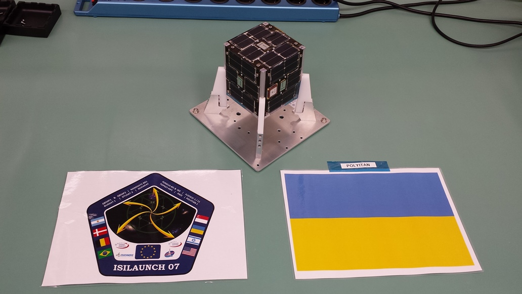 Супутник КПІ PolyITAN-1 перед встановленням в пусковий контейнер